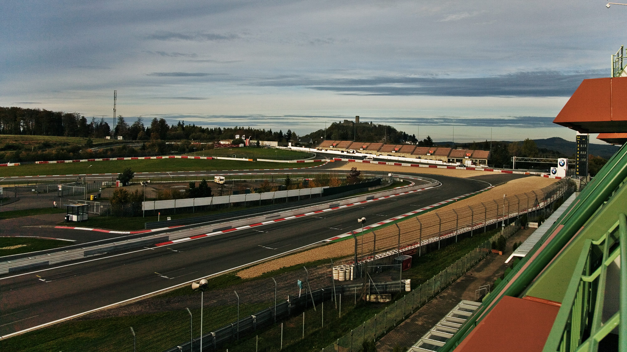 Nürburgring